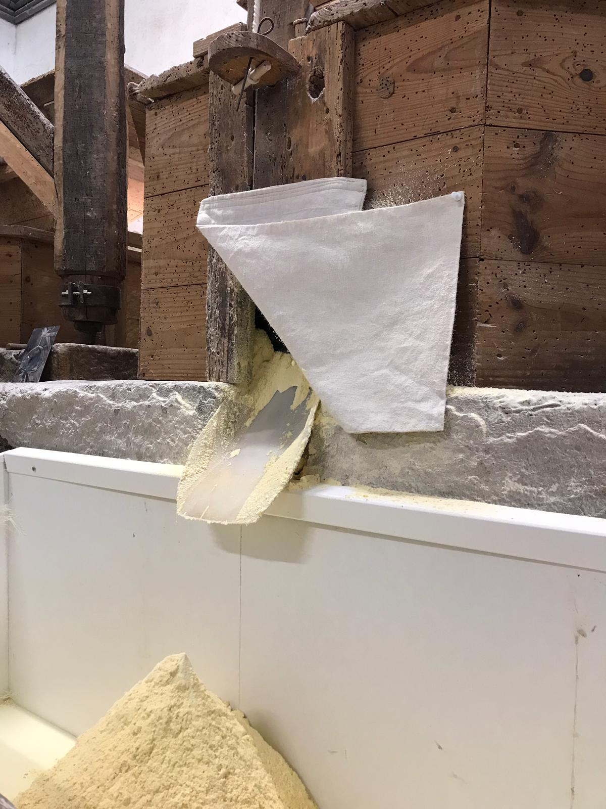 Ehoketa